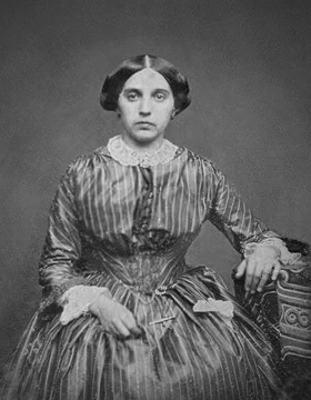 Camila O'Gorman (1825-1848) joven irlando-argentina fusilada en el Cuartel General de Santos Lugares de Rosas, hoy San Andrés, Partido de San Martín, Provincia de Buenos Aires.